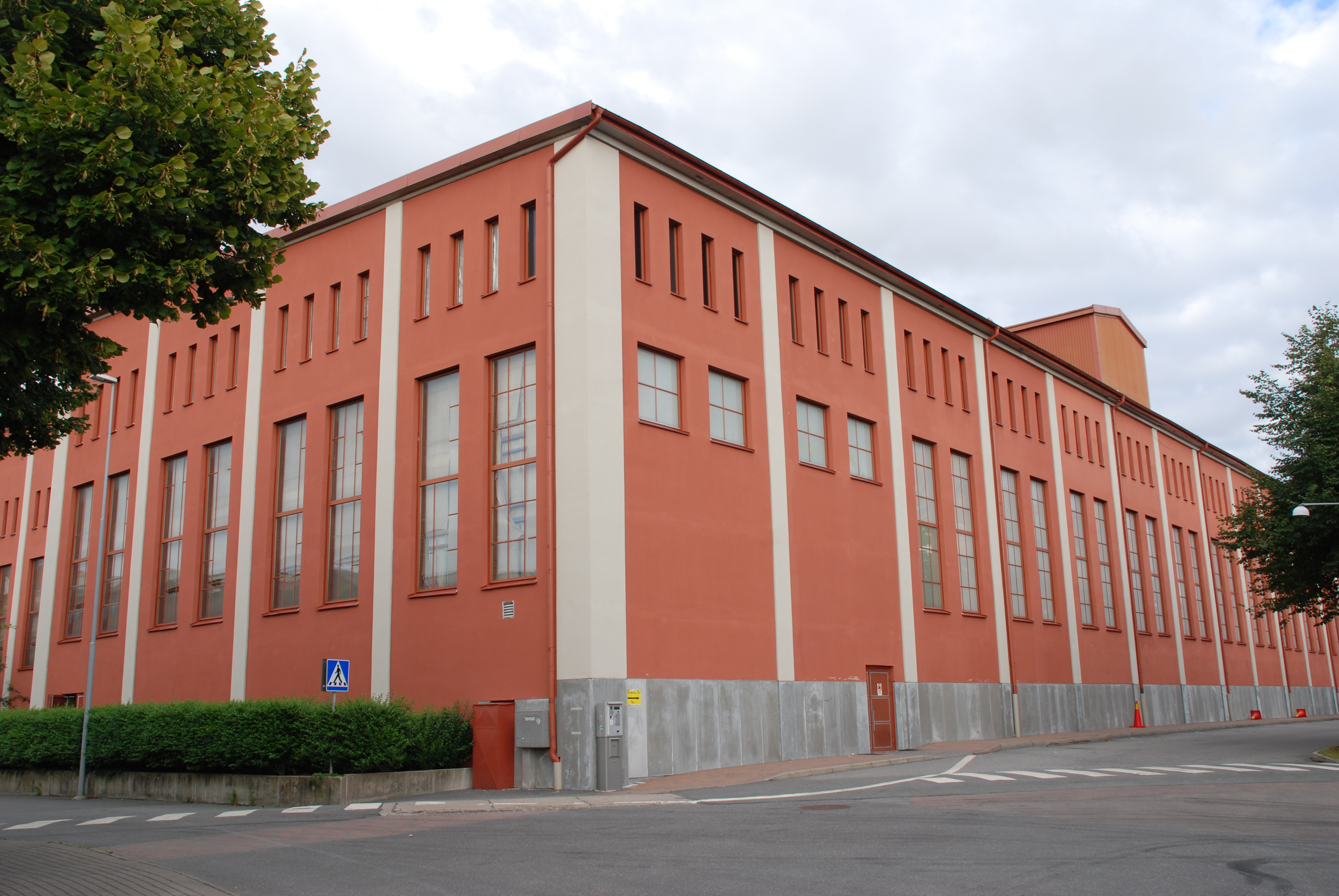 Lundbystrands sporthall vid Valdemar Noréns Gata i stadsdelen Lundbyvassen i Göteborg.